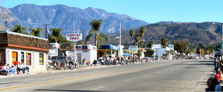 Looking up Yucaipa Blvd